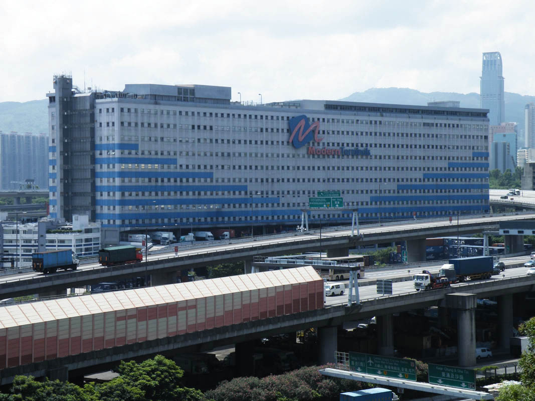 Modern Terminals 現代貨箱碼頭